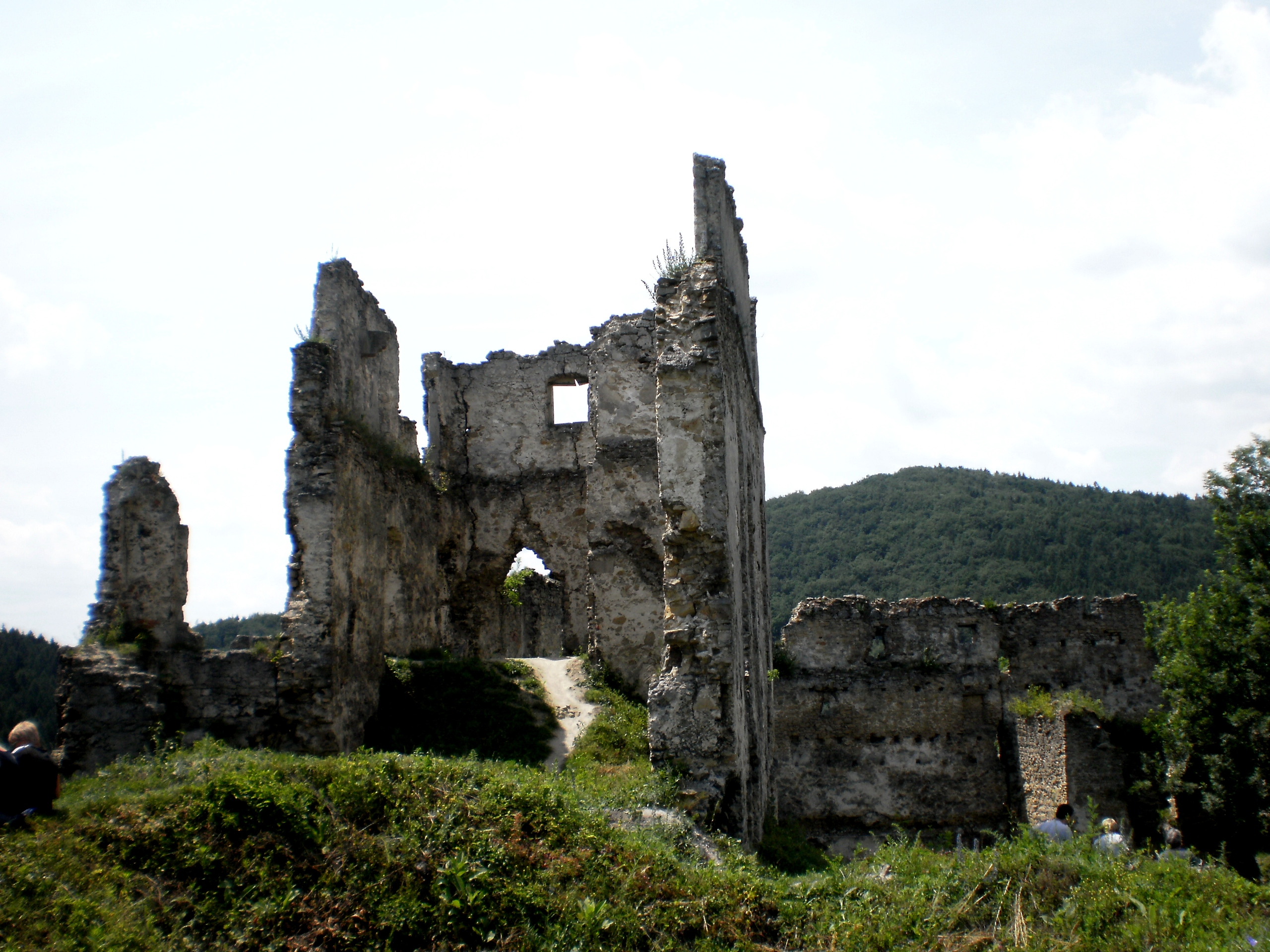 Pozostatky hradu